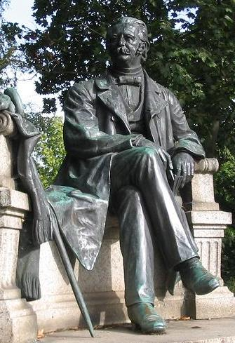 Denkmal Theodor Fontane Neuruppin, Ausschnitt. Das Denkmal wurde nach Entwürfen von Max Wiese errichtet, ebenso wie das Neuruppiner Denkmal für Karl Friedrich Schinkel (* 1781; † 1841), der gleichfalls in Neuruppin geboren wurde.